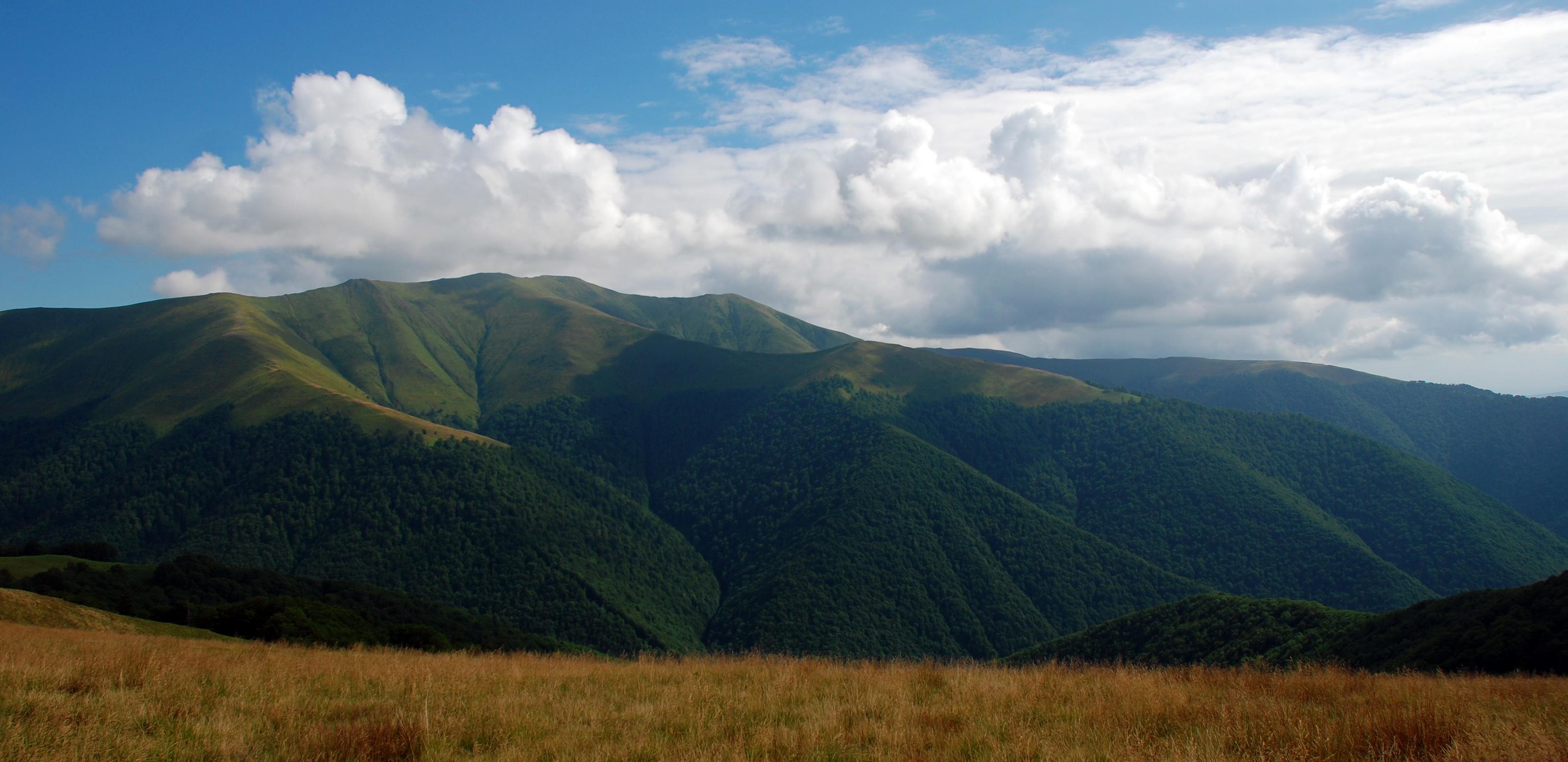 «Росішний», Воловецький р-н, ДП «Воловецьке ЛГ», Нижньоволовецьке л-во квартали 19, 24, 25